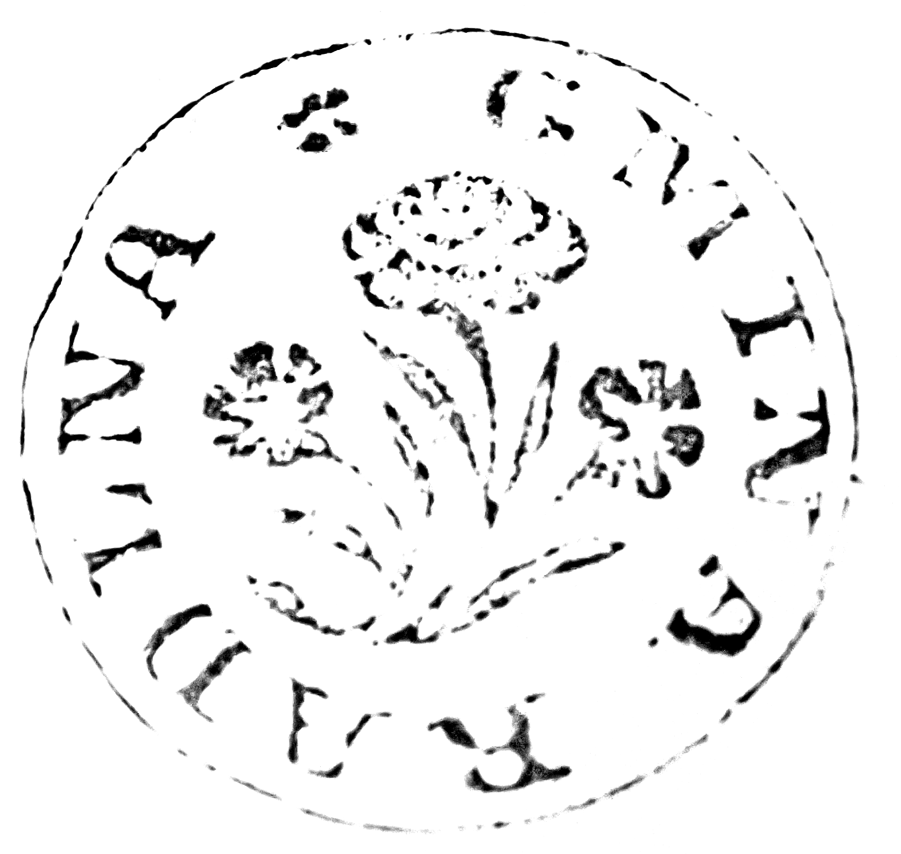 Pieczęć wiejska wsi Radlna w powiecie tarnowskim. Na podstawie odbicia pieczęci z 1909 r.